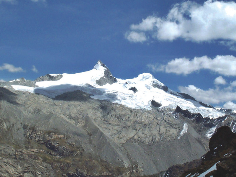 Nevado Paricaca, Picos Norte (5730) y Sur (5750) entre las provincias de Jauja (región Junín) y Yauyos (región Lima)